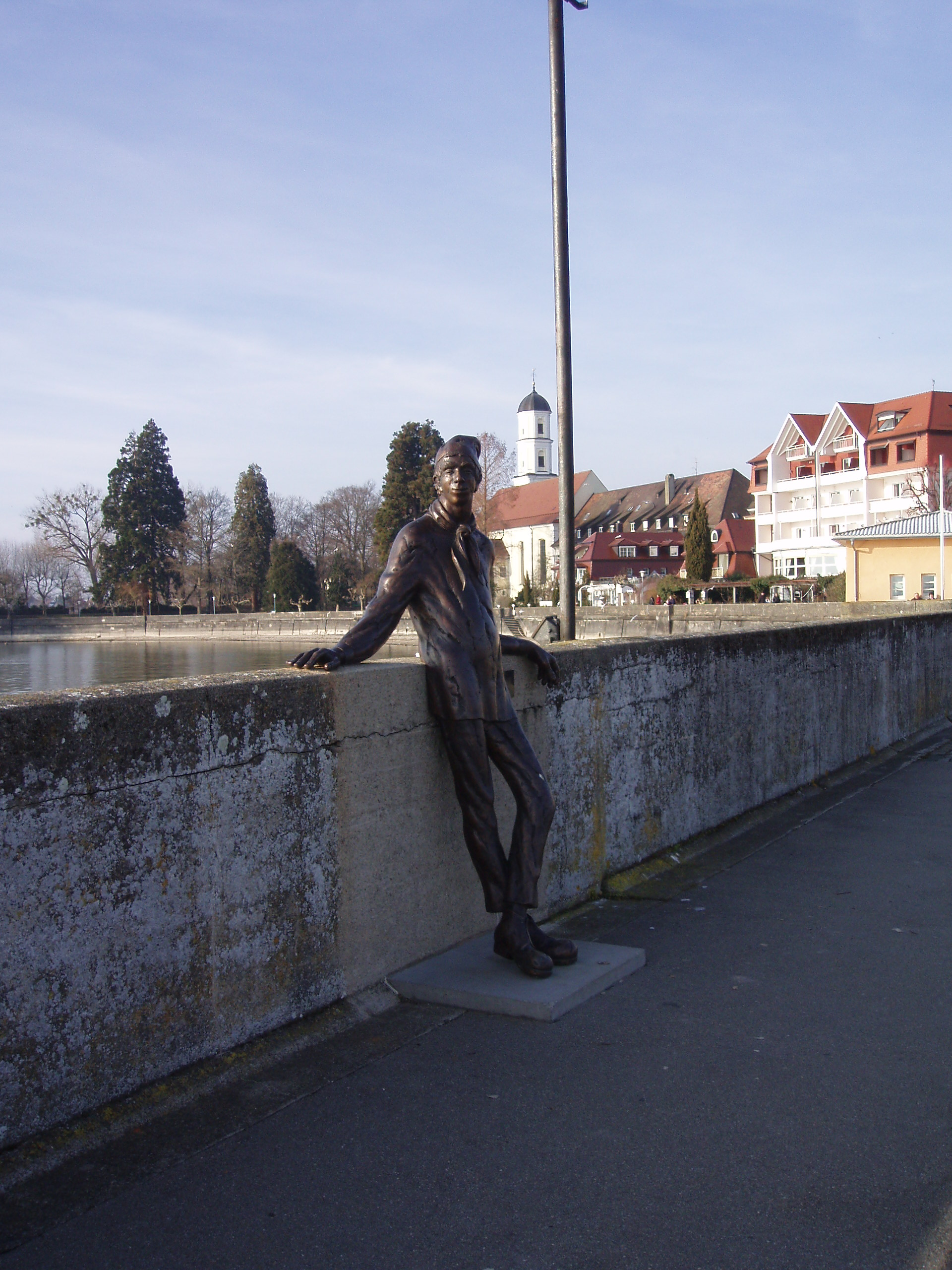 Figur des Dammglonkers in Langenargen von Roland Martin, 2006